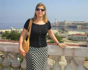 poetas españoles S. XX poetas españoles S. XXI